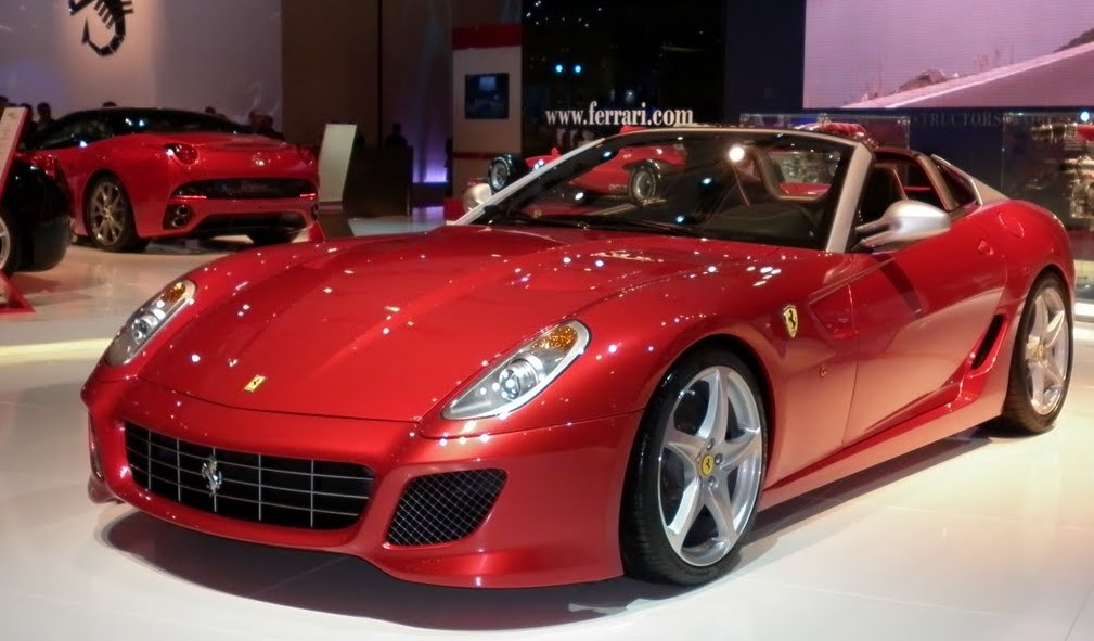 stand Ferrari, Mondial de Paris 2010